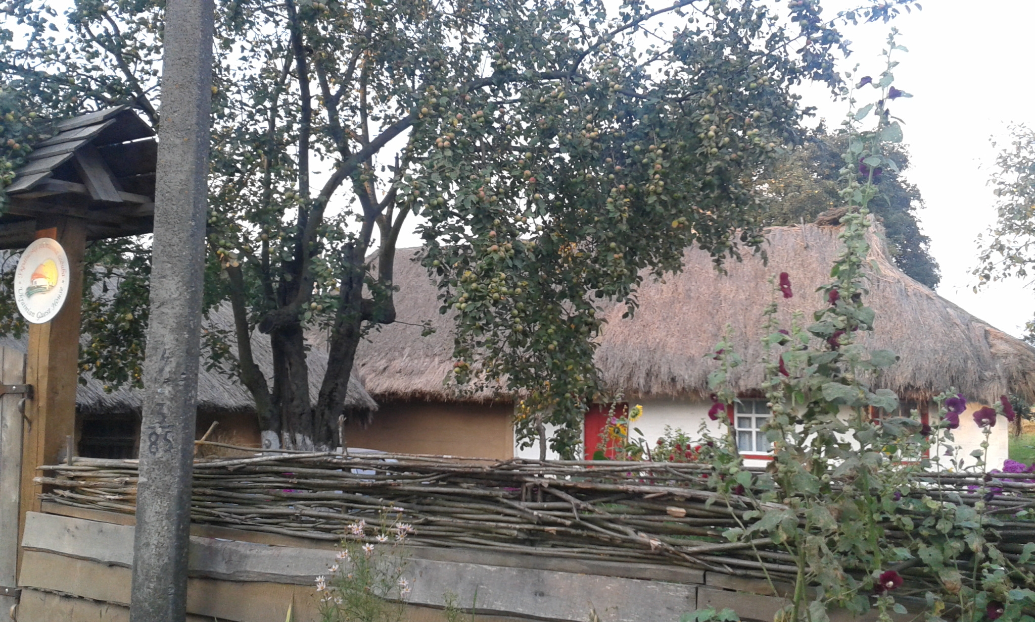 «Культурно-мистецький центр «Поліська хата»